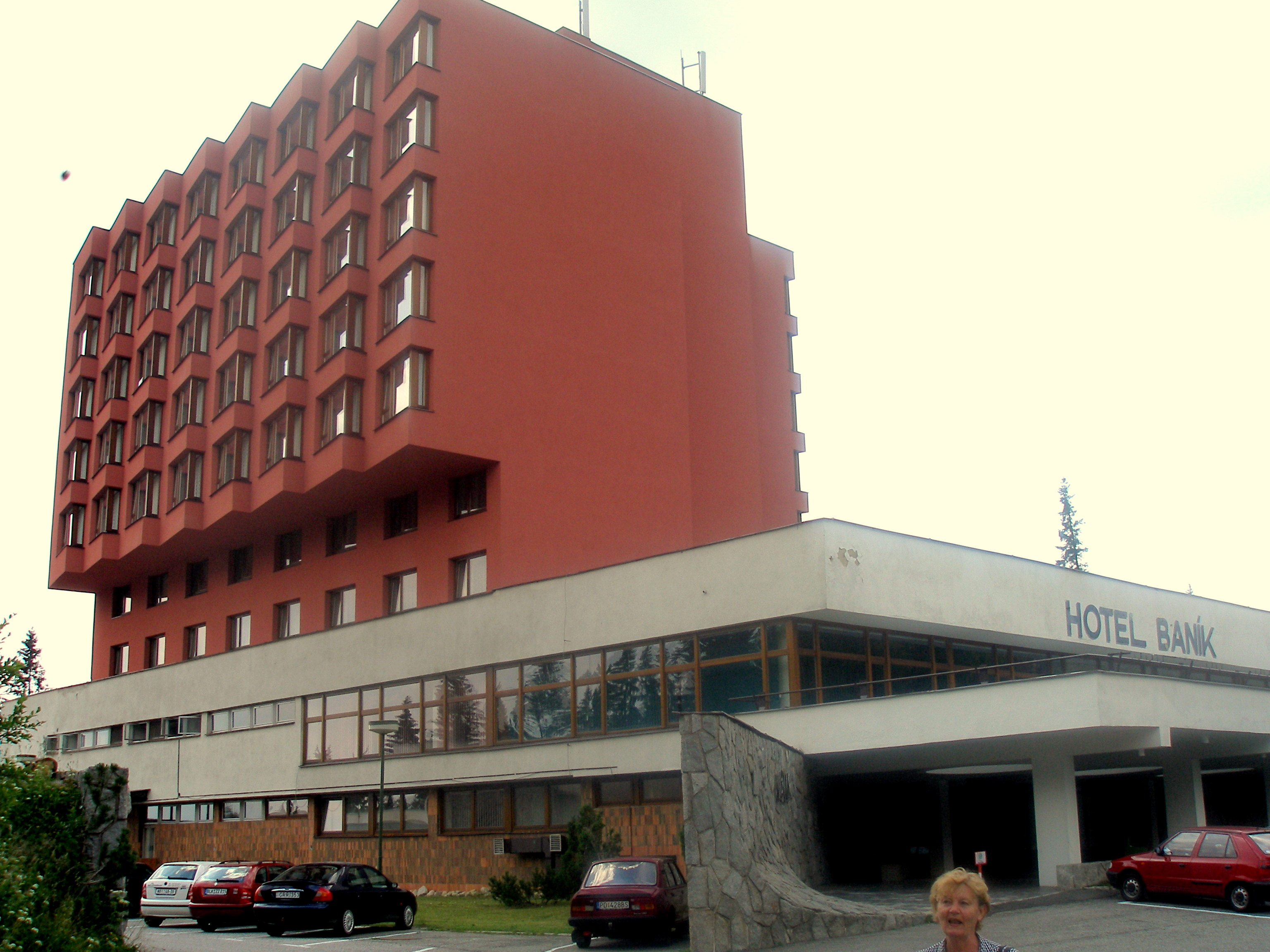 Tatranská osada Štrbské Pleso